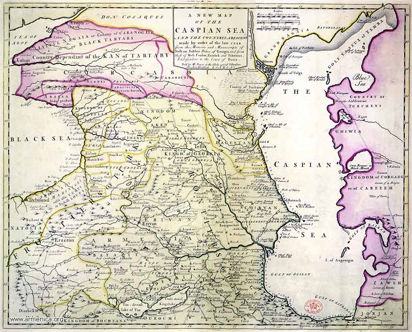 En ny karta över Kaspiska kartan och intilliggande länderna, skapad på order av tsaren.